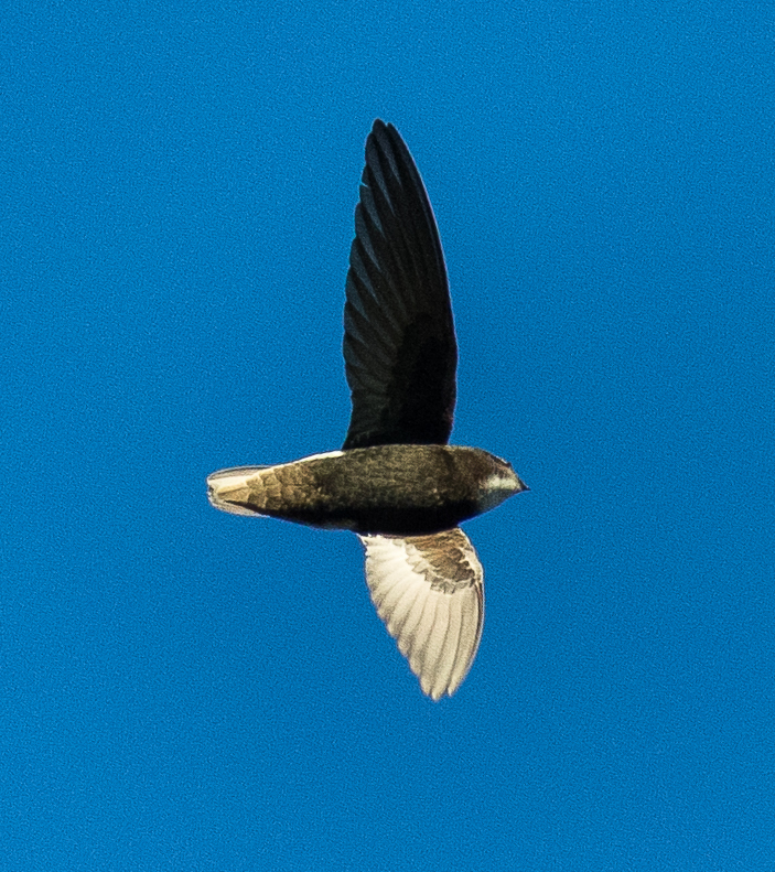 Little Swift - Aberdares - Kenya CD5A1334